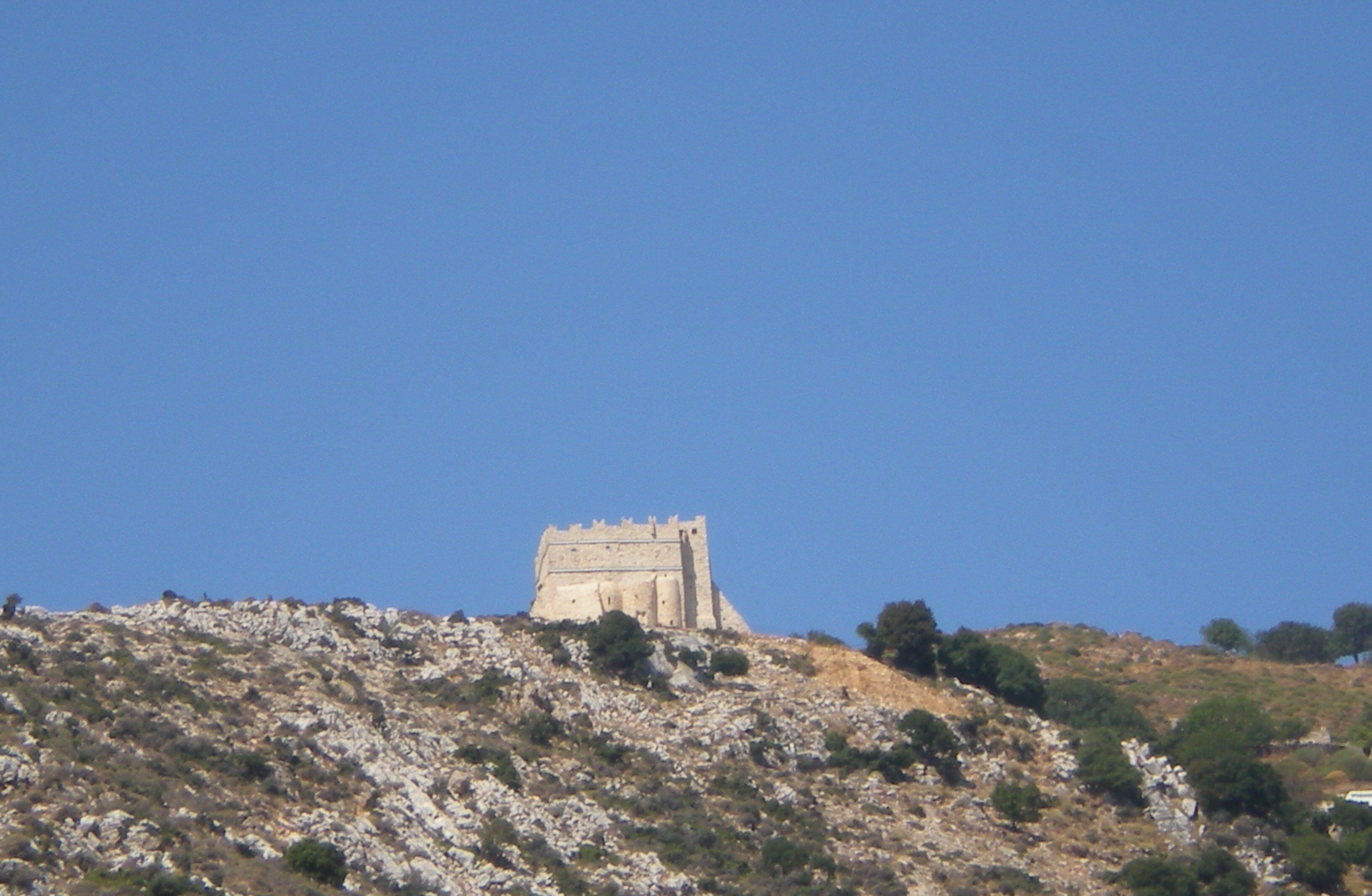 Απεικόνιση του πυργομονάστηρου Φωτοδότη Χριστού. Λήψη στιγμιότυπου από την επαρχιακή οδό Δανακού-Λι(γ)αριδίων